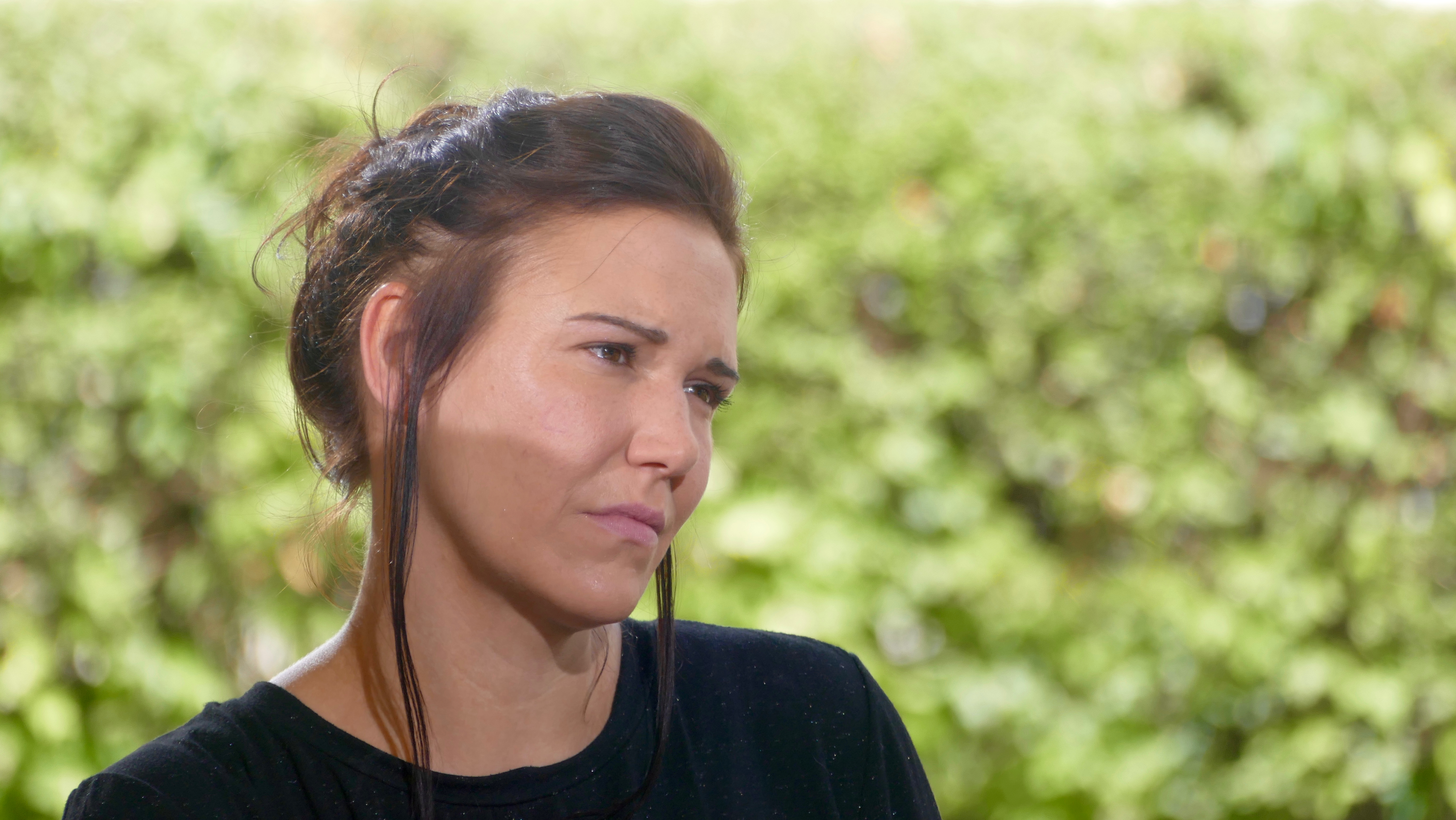 Birgit Birnbacher, Bachmannpreis 2019 beim Interview vor dem ORF-Theater